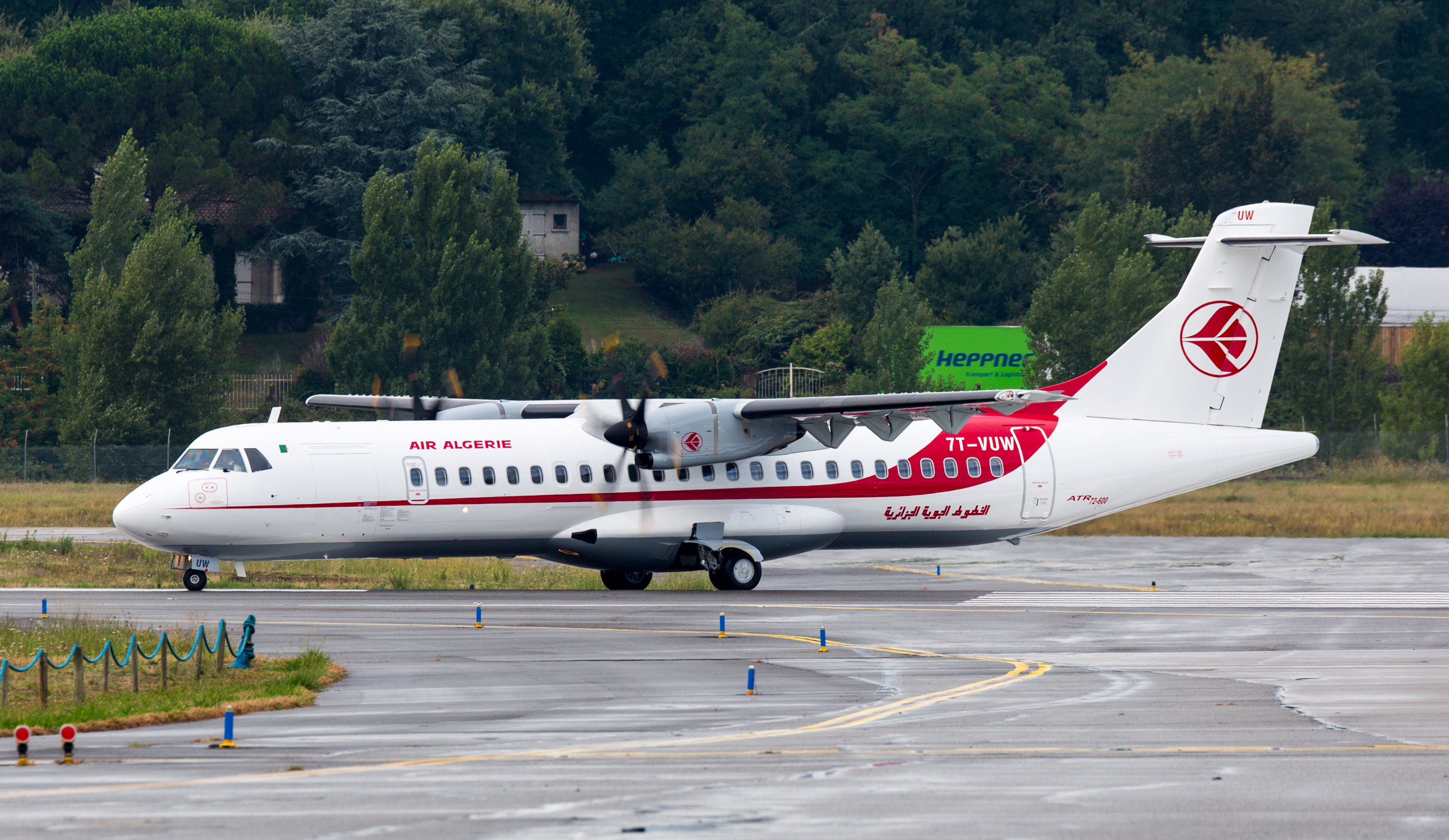 Delivery flight